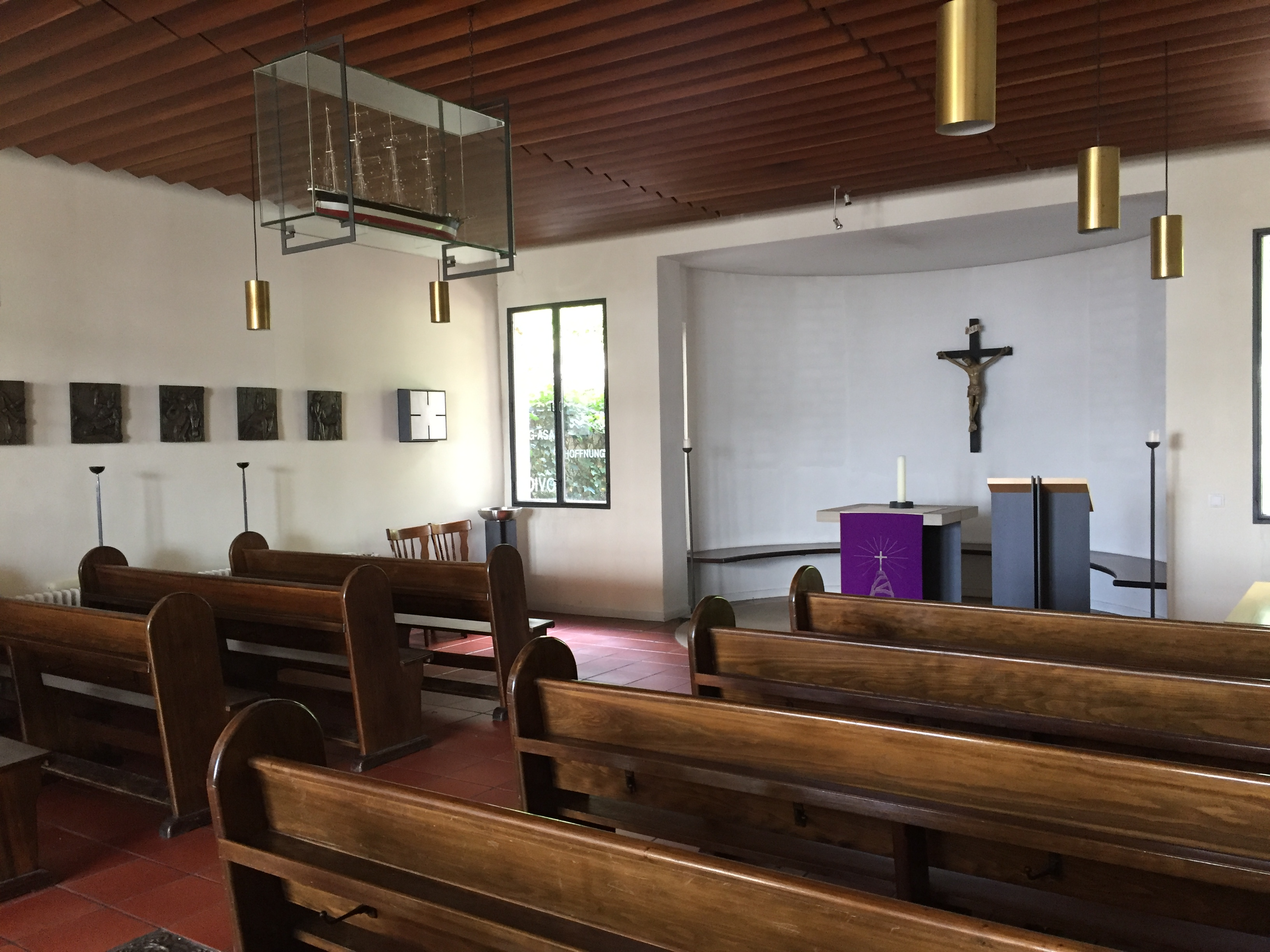 Die Seemannskirche St. Clemens am Hafen befindet sich im Gebäude der Deutschen Seemannsmission Hamburg-Altona.